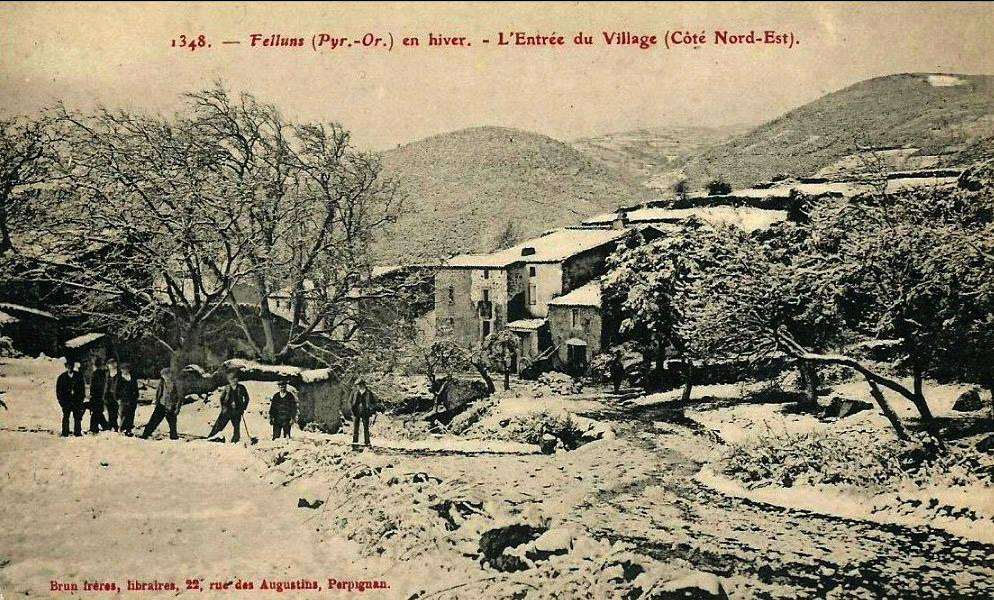 Felluns en hiver : l'entrée du village